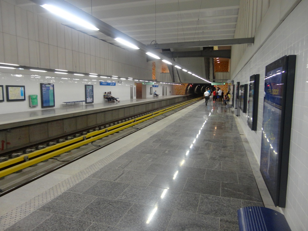 Metro d'Alger, station Bachdjarah